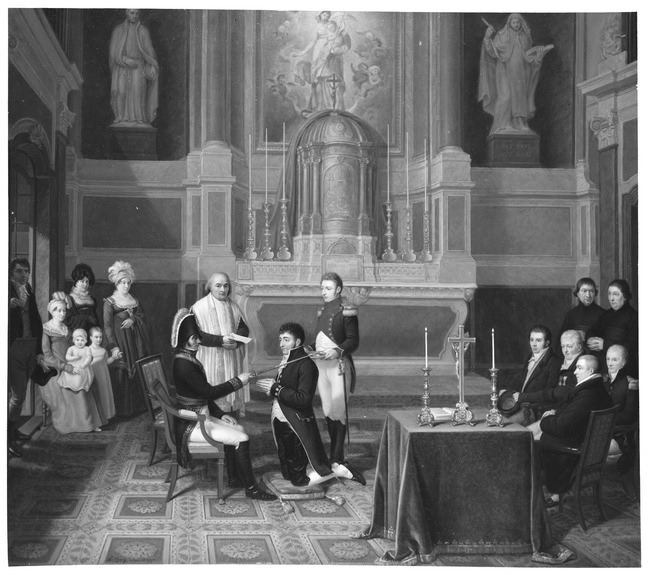 Petrus Jodocus van Oosthuyse krijgt de Spaanse ridderorde(koning Karel III) in de koninklijke kapel van Spanje aan het Westeinde te Den Haag. In interieur van kapel, voor het altaar (schilderij van de maagd met kind, 2 religieuze beelden, kaarsen, kandelaars, crucifixen), vlnr: schilder J.J. Loose; zittend: H.P.V. van Oosthuyse met zoon petrus A.M. van Rijckevorsel op schoot; 4e van links: Cornelia L. Hansen, zwart kostuum, hoed met veren; Louisa Paulina C.C. van Rijckevorsel, als kind met haar hand in die van Margaretha de Jongh; zittend in ambtskostuum: Miguel d'Alava, geeft ridderslag; pastoor Franciscus J. Raynal, staand in priestergewaad; geknield op kussen: Petrus J. van Oosthuyse, terwijl hij tot ridder wordt geslagen, achter hem: M. de la Torre, in uniform, achter tafel:zittend met hoed in de handen: Jacobus J. van Rijckevorssel; zittend met 2 ridderorden op kostuum: Theodoor Jan Roest van Alkemade; zittend naast hem: Adrianus de Jongh; iets achter hem: Jean du Charmail de Trevey (epaulet zichtbaar); geheel rechts:2 staande figuren (prelaten)., , , 'Alle de in het stuk voorkomende personen zijn alle naar het leven geschildert en welgelijkende portraiten' (Archief de Wamberg (Van Rijckevorsel), manuscr. cat., p.40)